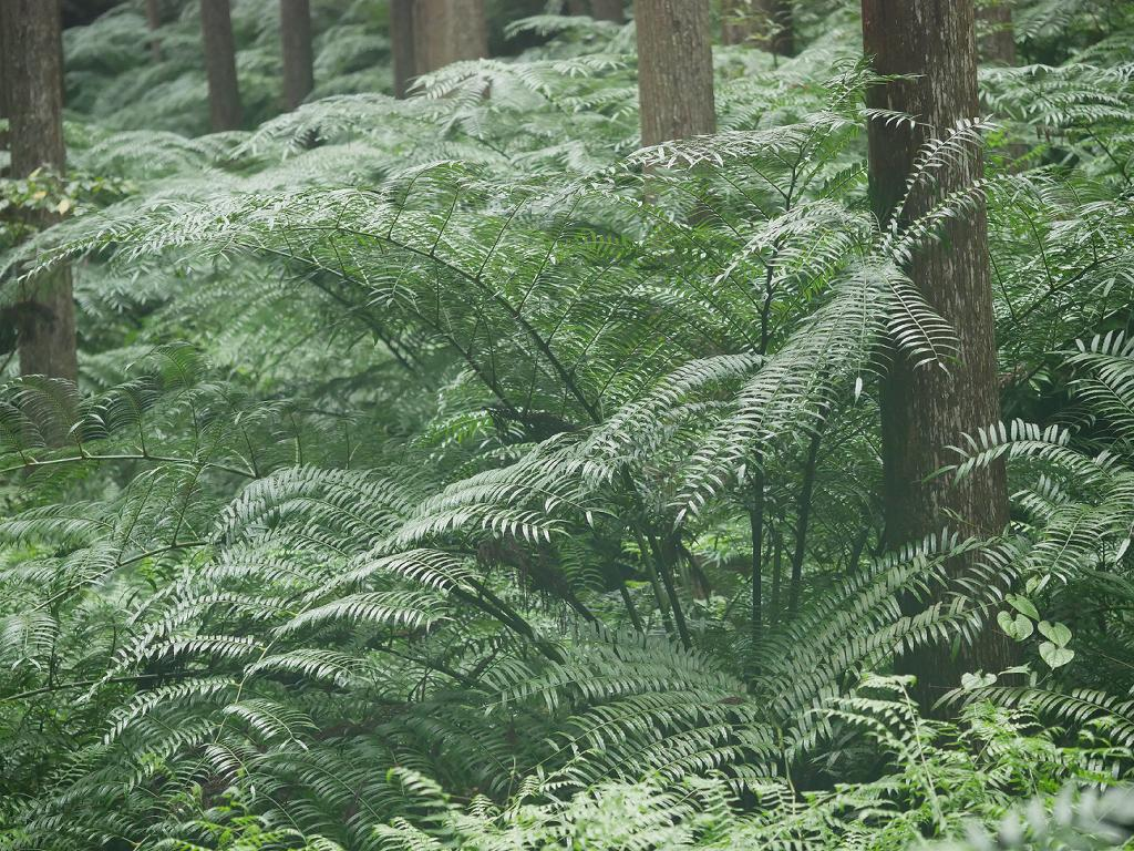 2019/03/25 三重県：Mie Pref. Japan